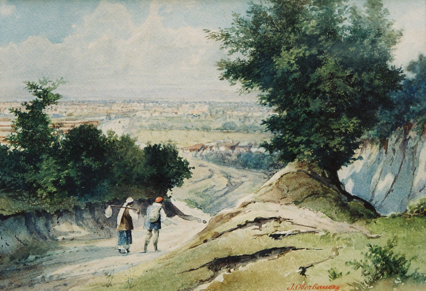 Изглед от местността "Кръста"